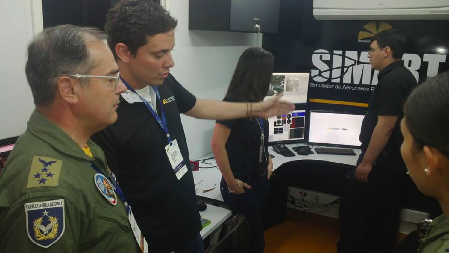 Comandate de la Fuerza Aerea de Chile visita stand de CODALTEC en la feria F-AIR.